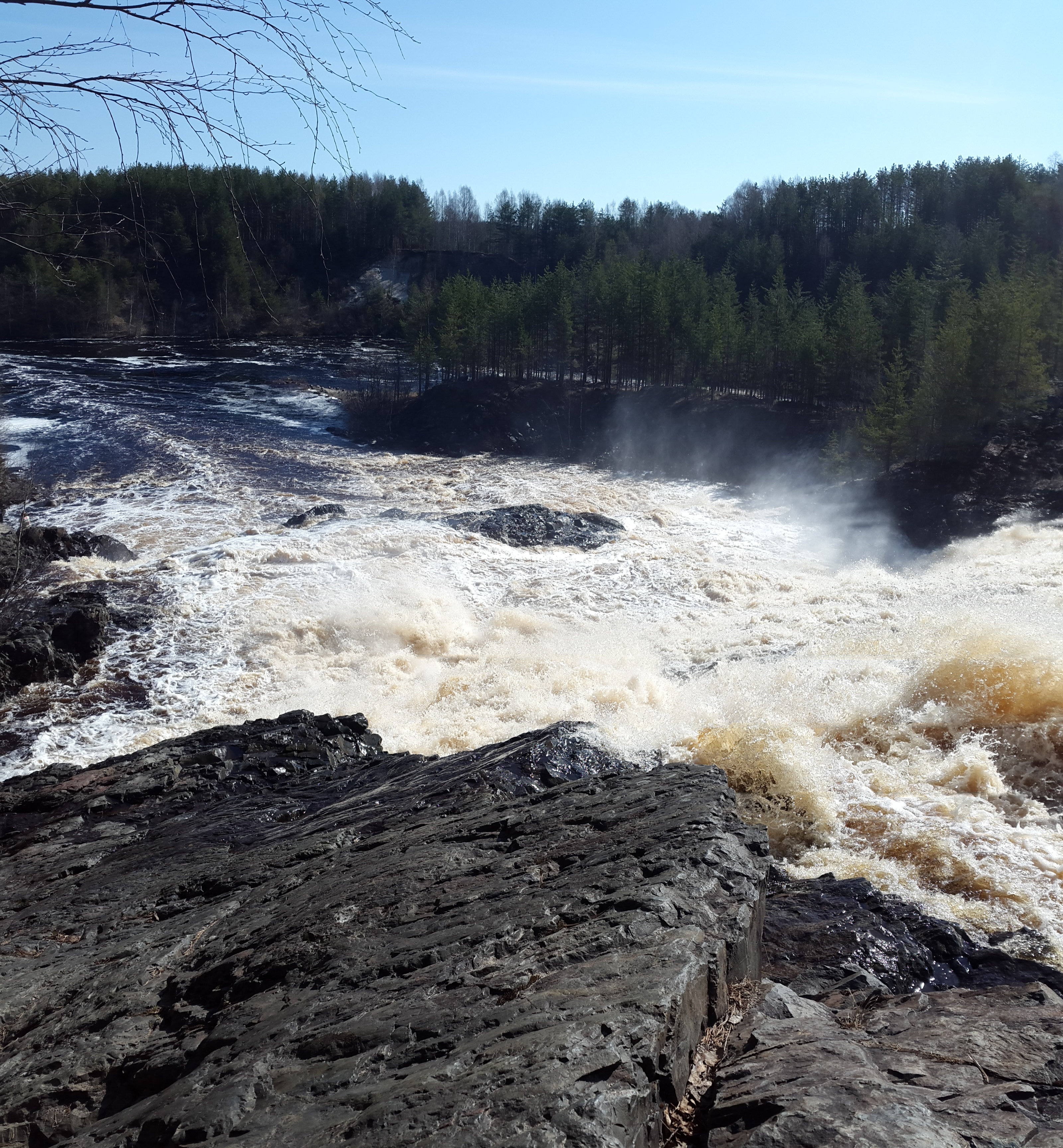 Гирвасский разрез каньона р. Суны: В каньоне р. Суна у плотины, расположенной в южной части п. Гирвас,Гирвас,Кондопожский район, This image is related to the protected area of Russia number 1010025